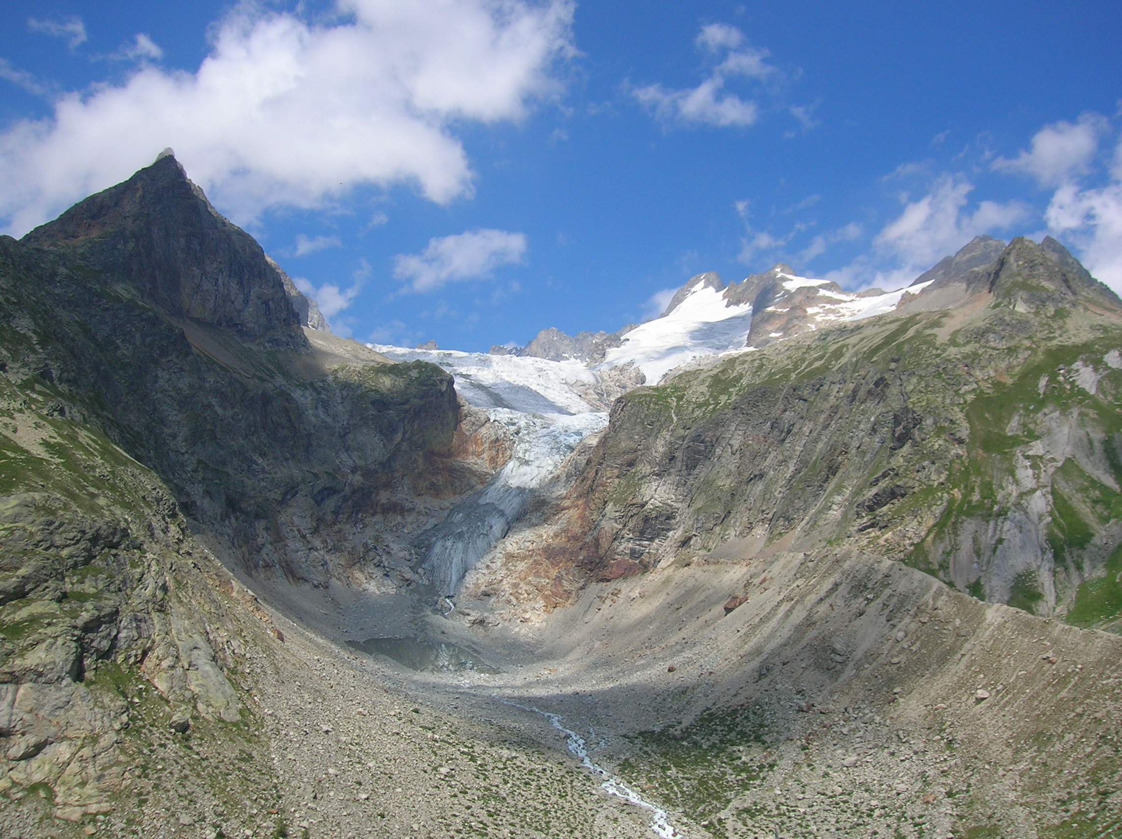 ghiacciaio di Pré de Bard visto dal Rifugio Elena, in Val Ferret, comune di Courmayeur, Valle d'Aosta, Italia.